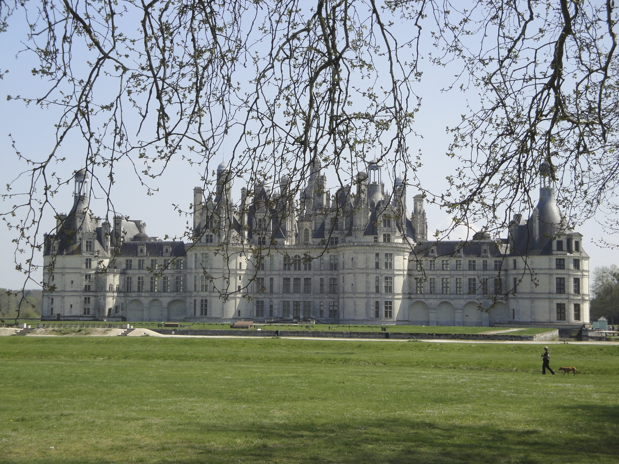 Vue du Château de Chambord